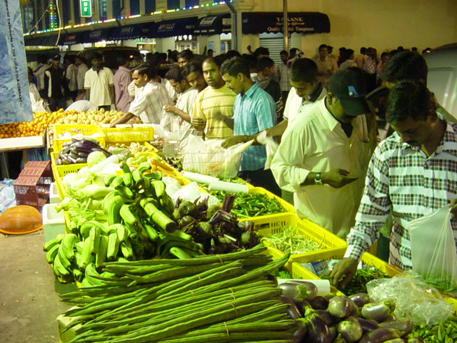 Vegetable market at Little India in Singapore.